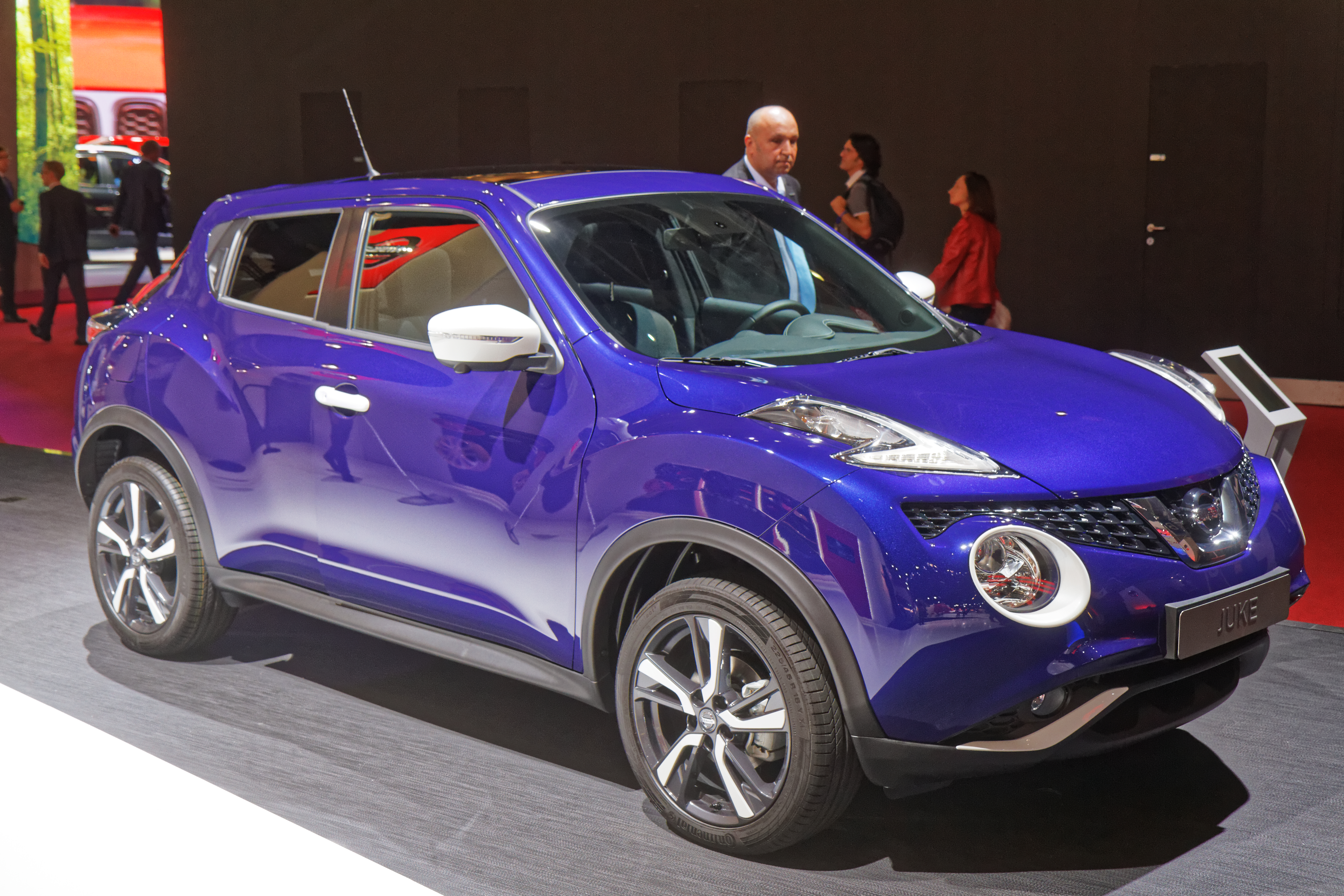 Une Nissan Juke présentée lors du mondial de l'automobile de Paris 2014.